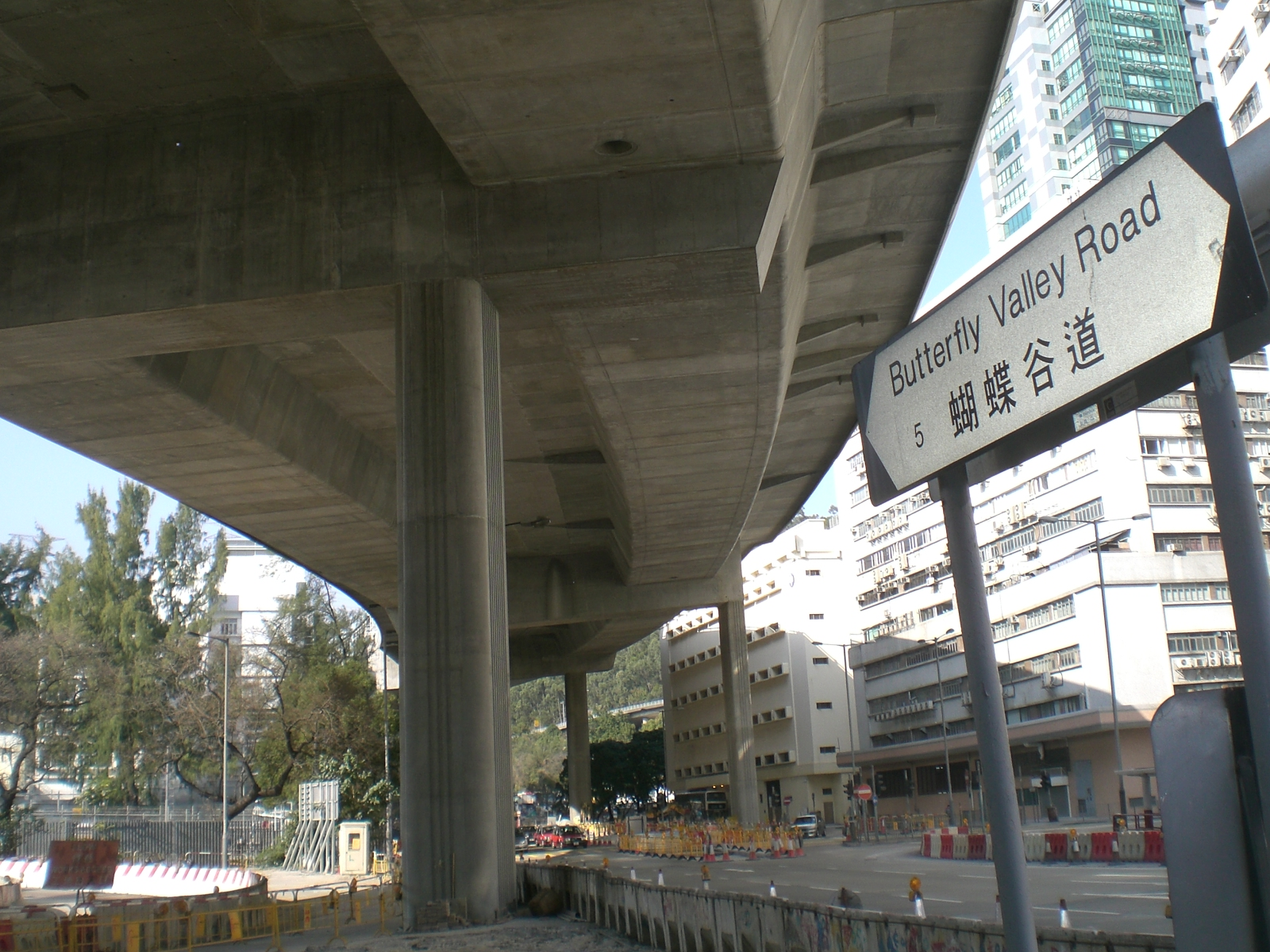 荔枝角蝴蝶谷道行車天橋